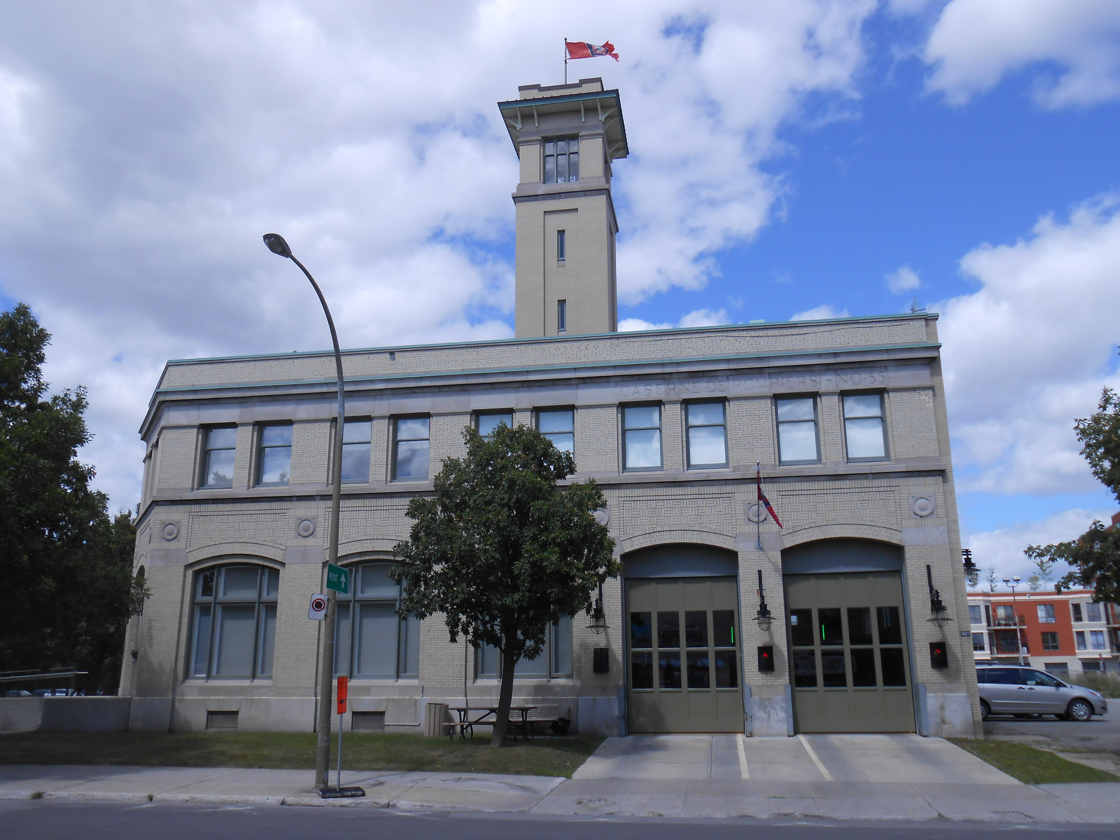 Poste de police numéro 27, caserne de pompier numéro 35, 10827, rue Lajeunesse / 550, boulevard Gouin Est (façade latérale), Montréal, construite en 1929